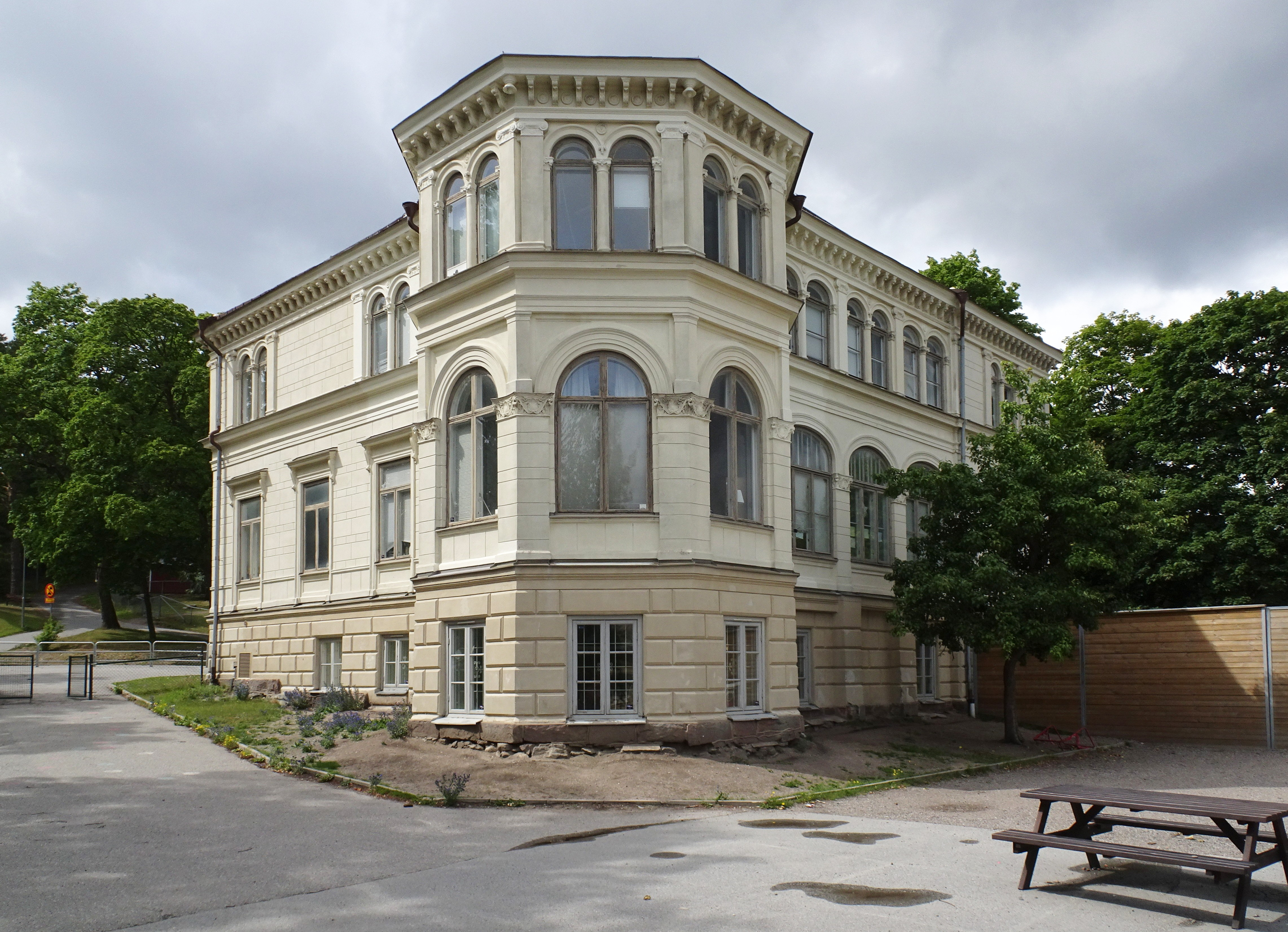 Villa Bellevue, arkitekt Ernst Jacobsson (1871)